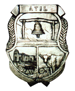 Escudo del municipio sonorense.